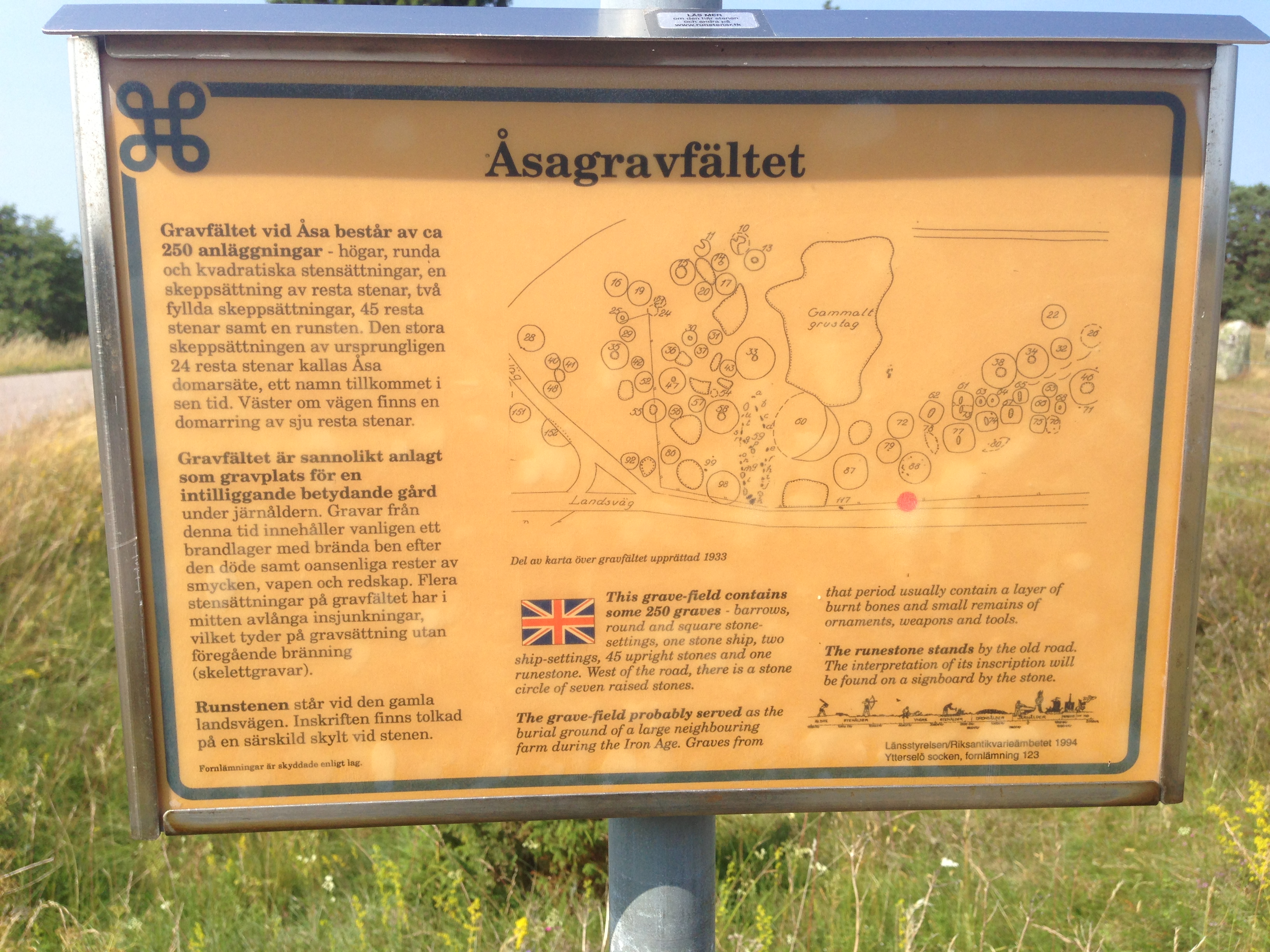 Informationsskylt Åsa gravfält, Selaön, Södermanland